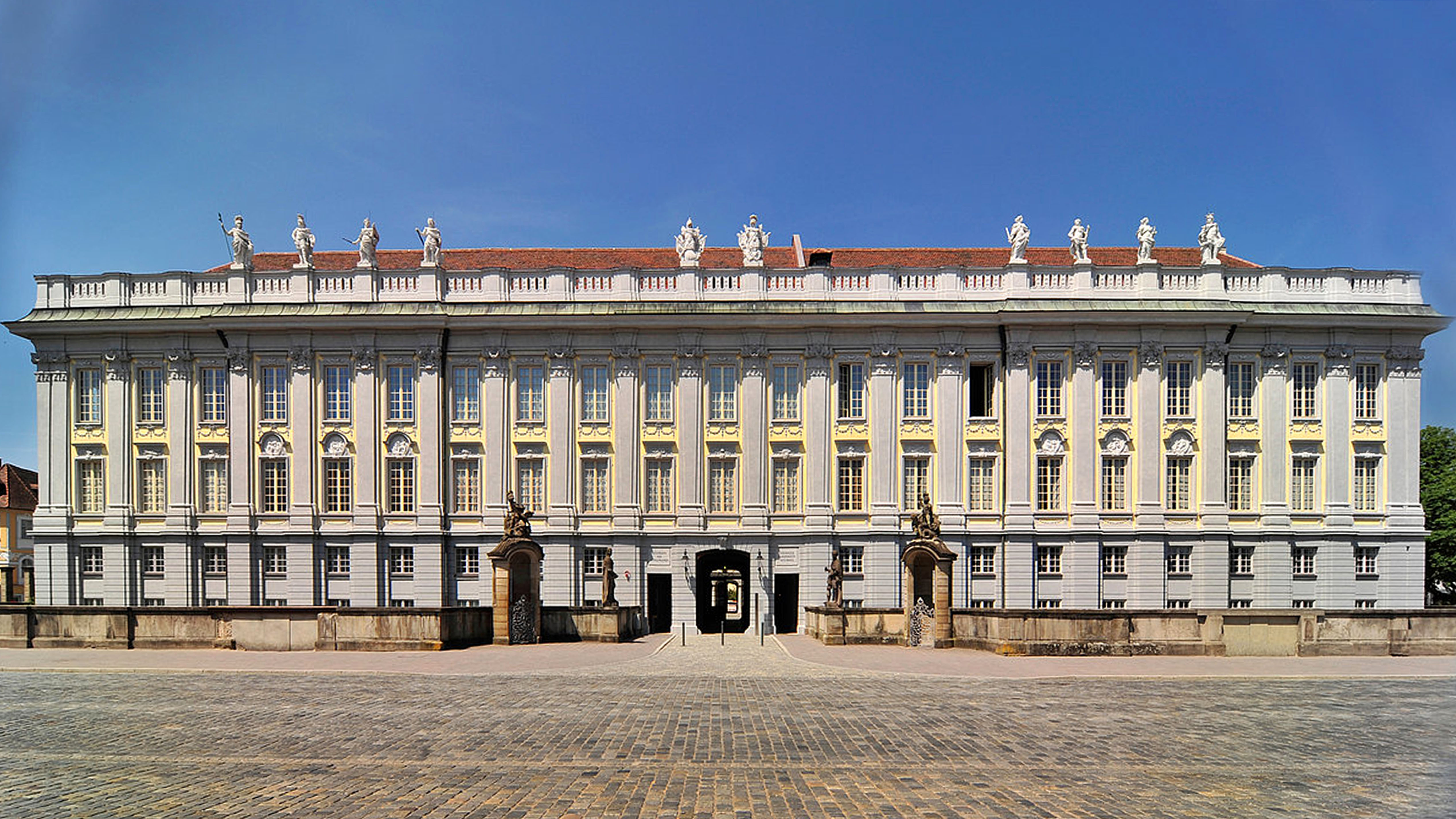 Residenz Ansbach, mit den beiden Schilderhäuschen mit Puttengruppen von Domenico Ferretti am Haupteingang